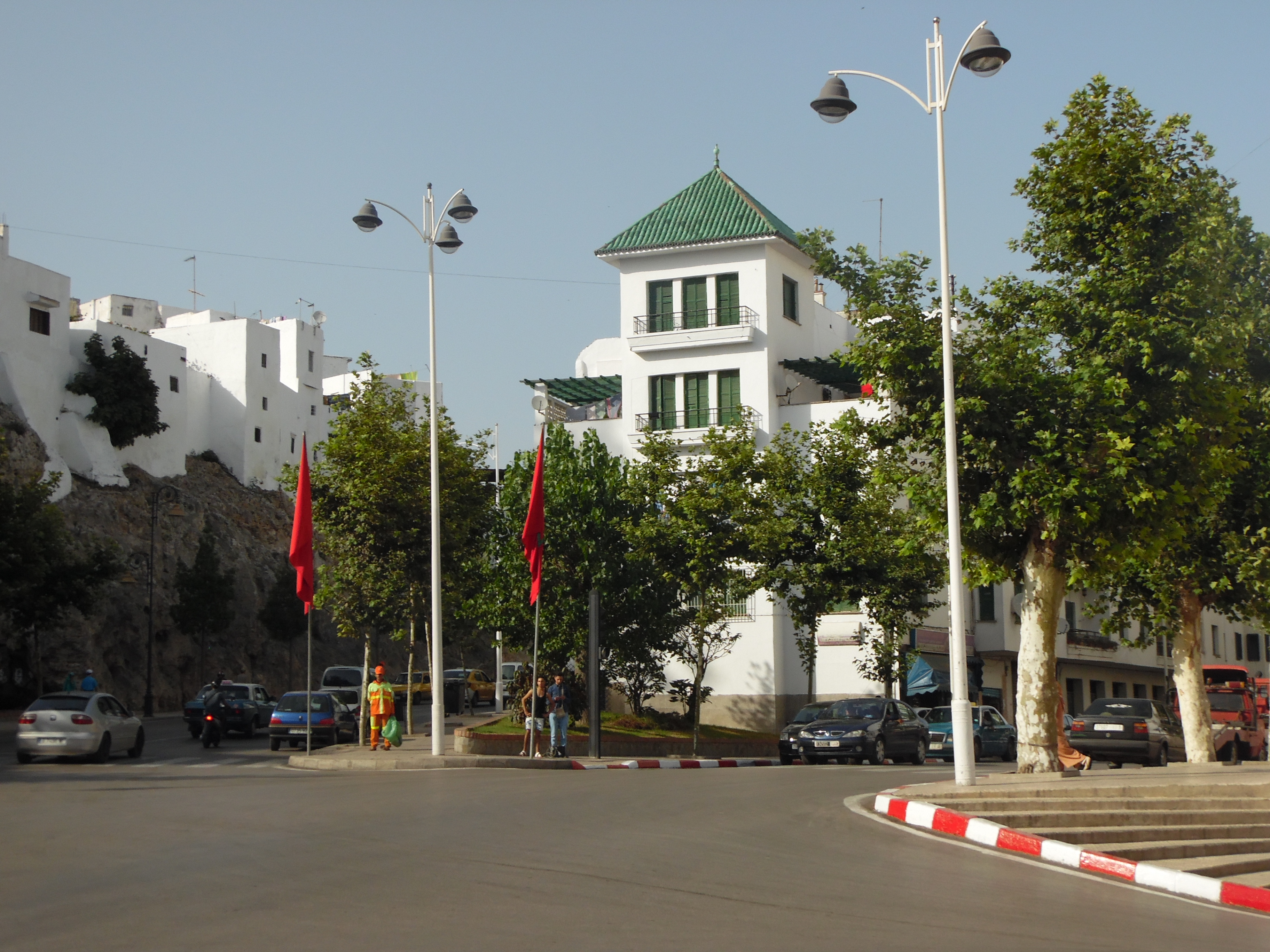 Vista de Tetuán